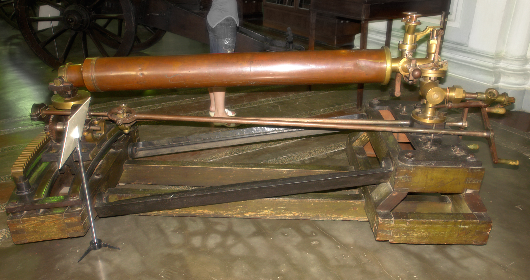 7-линейная (17.5-мм) опытная паровая пушка. Ствол: зелёная медь в кожухе из красной меди. Разработана инженер-полковником корпуса путей сообщения Карелиным. Изготовлена в 1826-29, Стрельба шаровыми пулями за счёт водяного пара, до 50 выстрелов в минуту. Испытания в 1829 году провалились и пушка была передана в арсенал Санкт-Петербурга. Военно-исторический музей артиллерии, инженерных войск и войск связи, Санкт-Петербург.